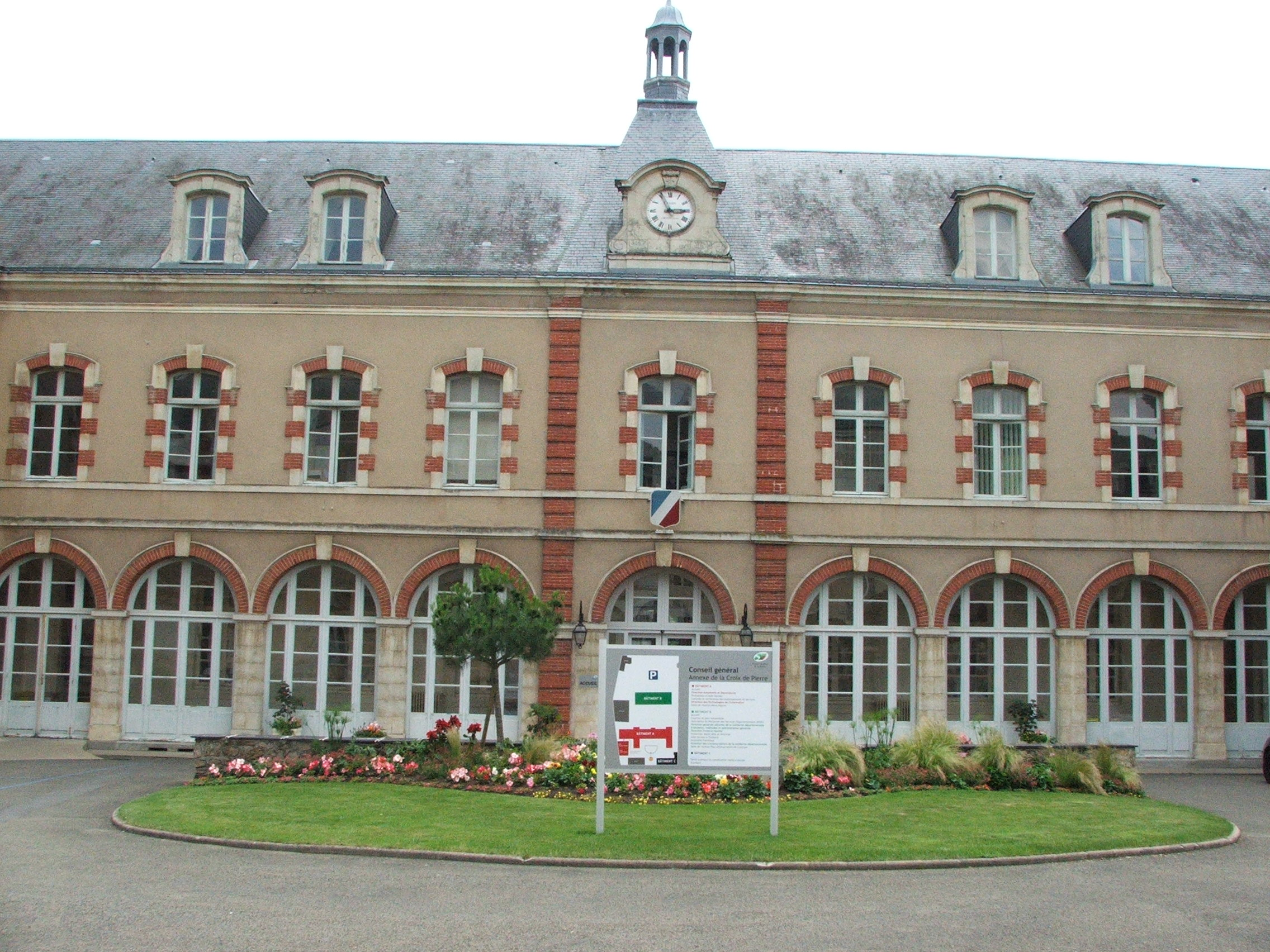 L'ancienne école normale du Mans, édifiée en 1860; aujourd'hui hôtel du département.